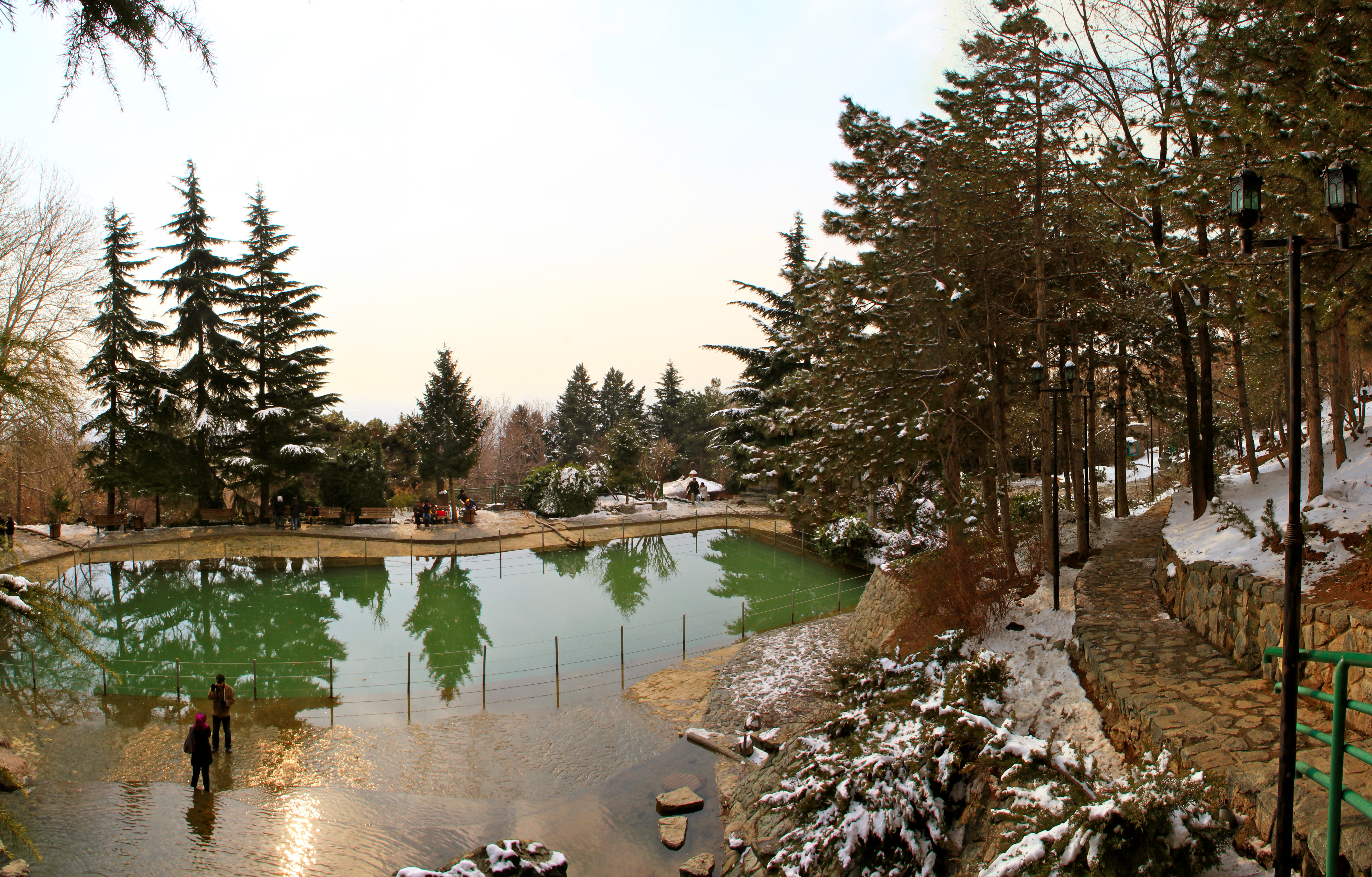 پارک سنگی جمشیدیه